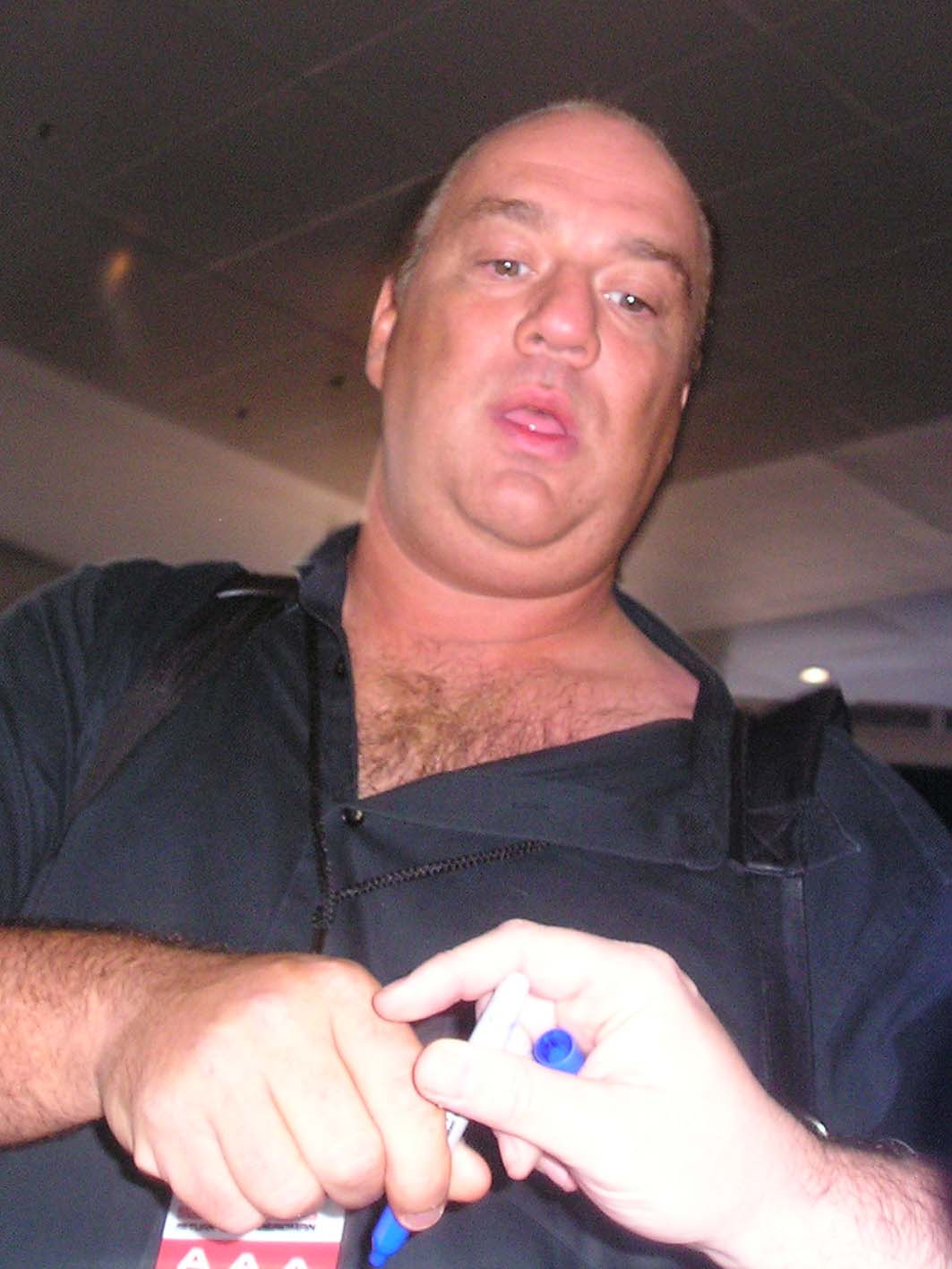 Wrestling Manager